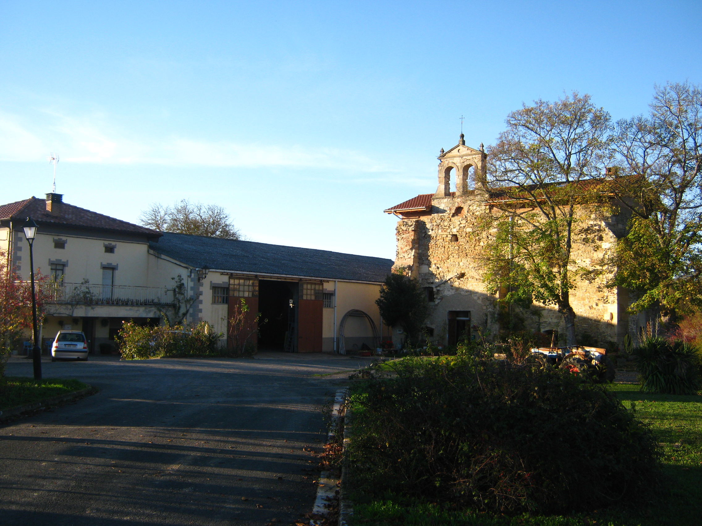 Bolívar (Álava, España)